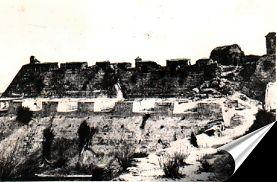 Foto del castillo san felipe en 1900.